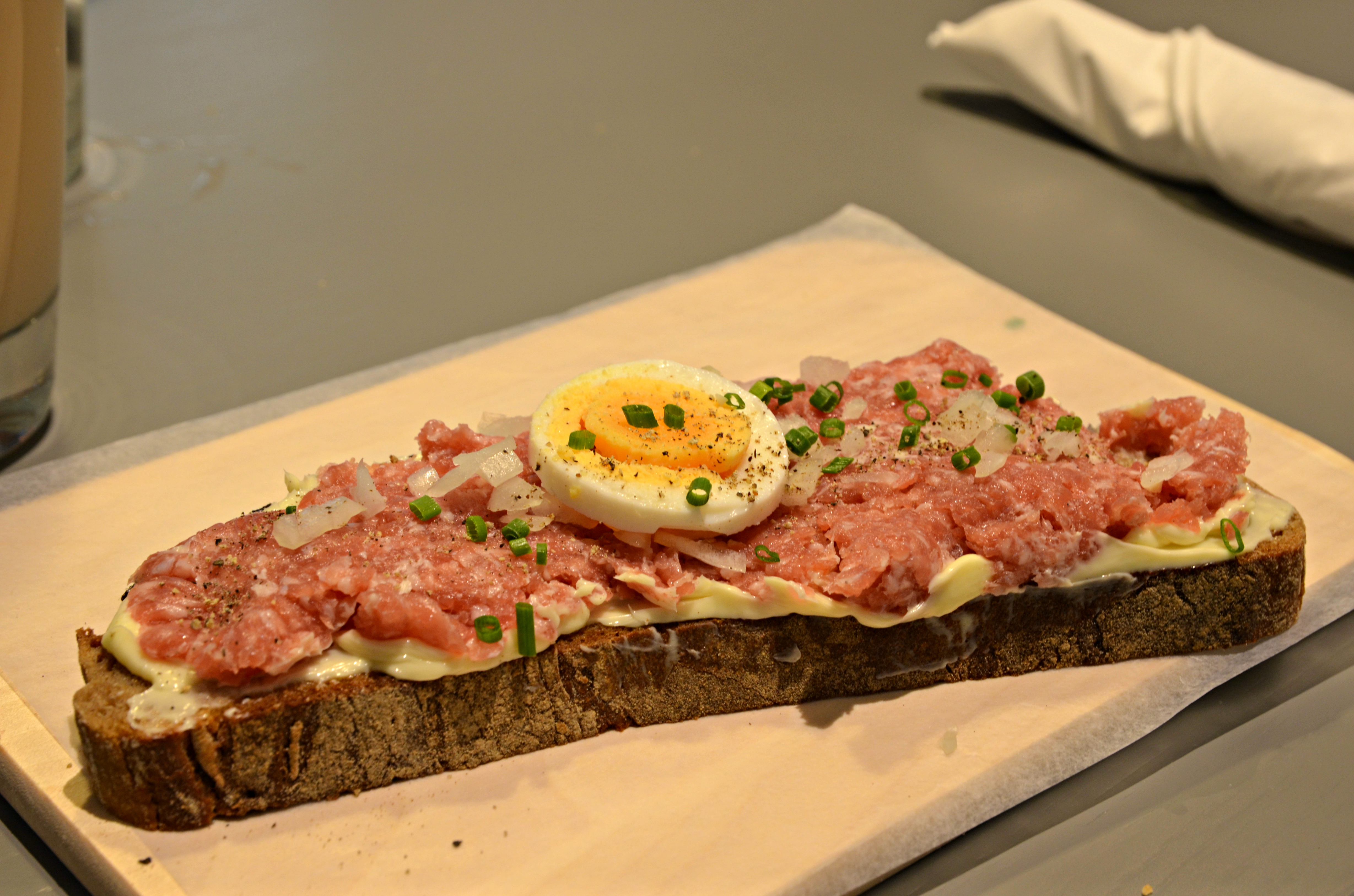 rp12 re:publica 2012